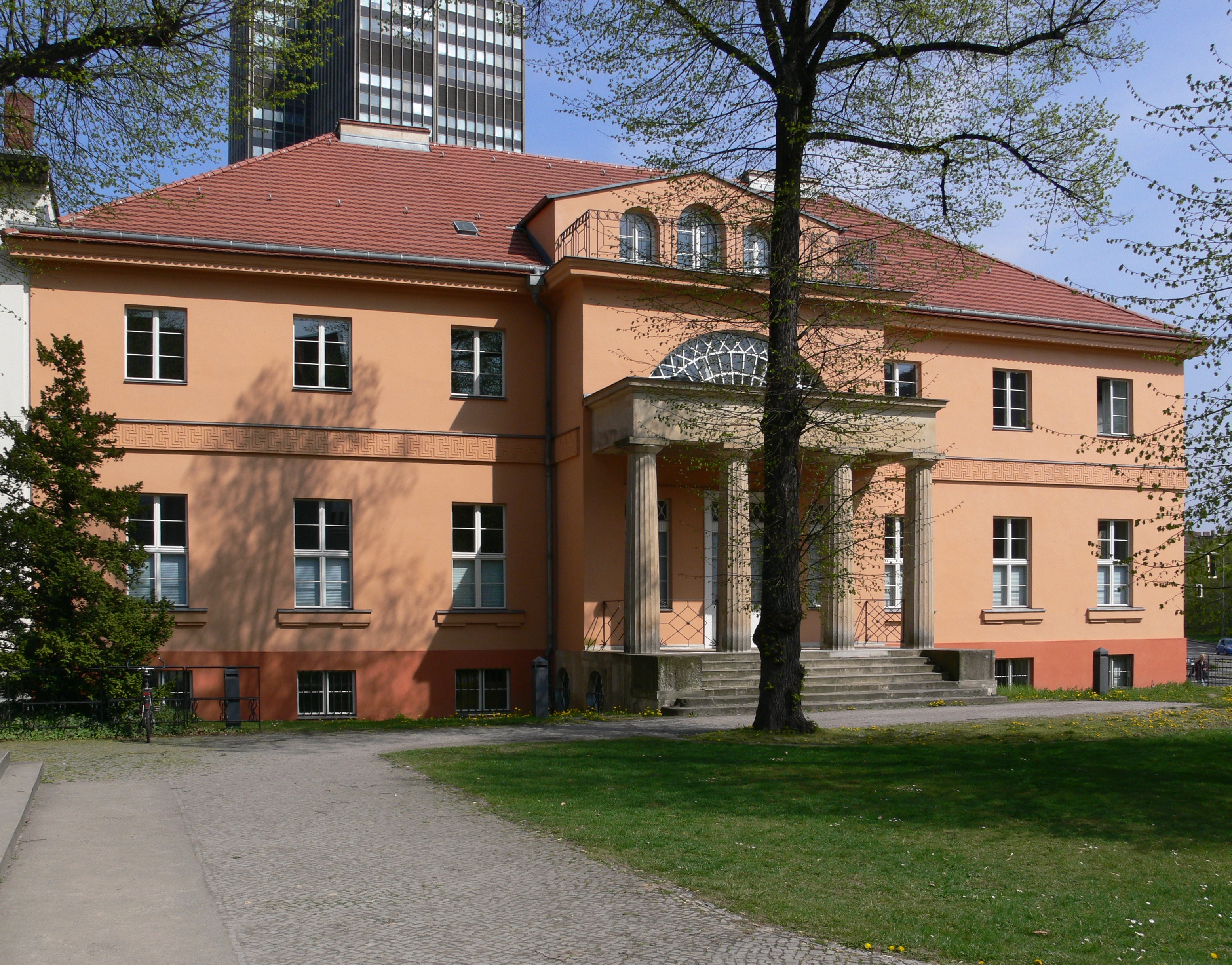 Berlin-Steglitz, Gutshaus Steglitz (Wrangelschlösschen)